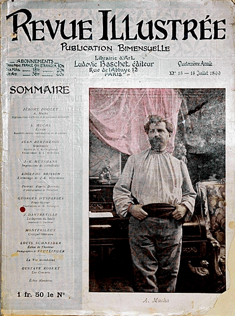 La Revue illustrée, couverture du 15 juillet 1899, 14e année : photochrome (?) représentant Alfons Mucha.